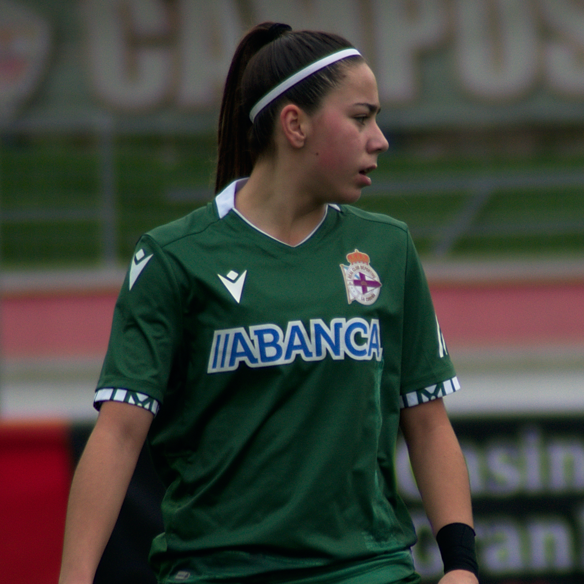 Athenea del Castillo Beivide, jugadora del Deportivo Abanca, en diciembre de 2019, en el encuentro ante el Madrid CFF.